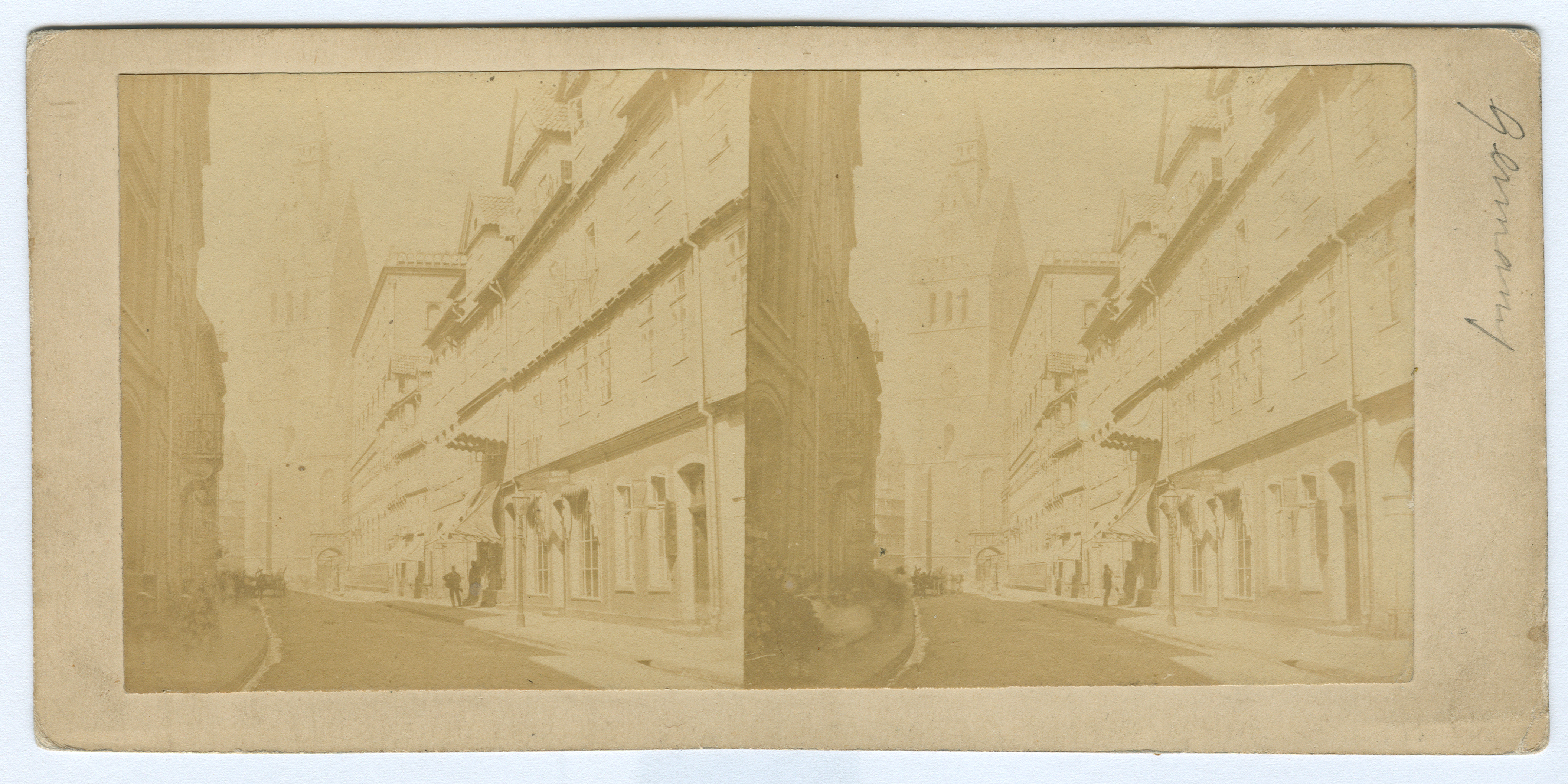 Frühe, "unechte" Stereoskopie, bei der die beiden Fotos nicht gleichzeitig, sondern zeitlich nacheinander geschossen wurden: Deutlich erkennbar die veränderten Positionen des Mannes rechts der unteren Bildmitte bzw. die Bewegungen rund um das Pferdegespann unten links. Die Bilder wurden geschossen, nachdem das ehemalige Buchbinderhäuschen am Turm der Marktkirche bereits abgebrochen war (nach 1857) und bevor die bis fast an den Westturm der Marktkirche reichenden Häuser Ecke Knochenhauerstraße/Marktplatz 1884 abgebrochen wurden (heute: Hanns-Lilje-Platz). Format ca. 17,3 x 8,4 cm